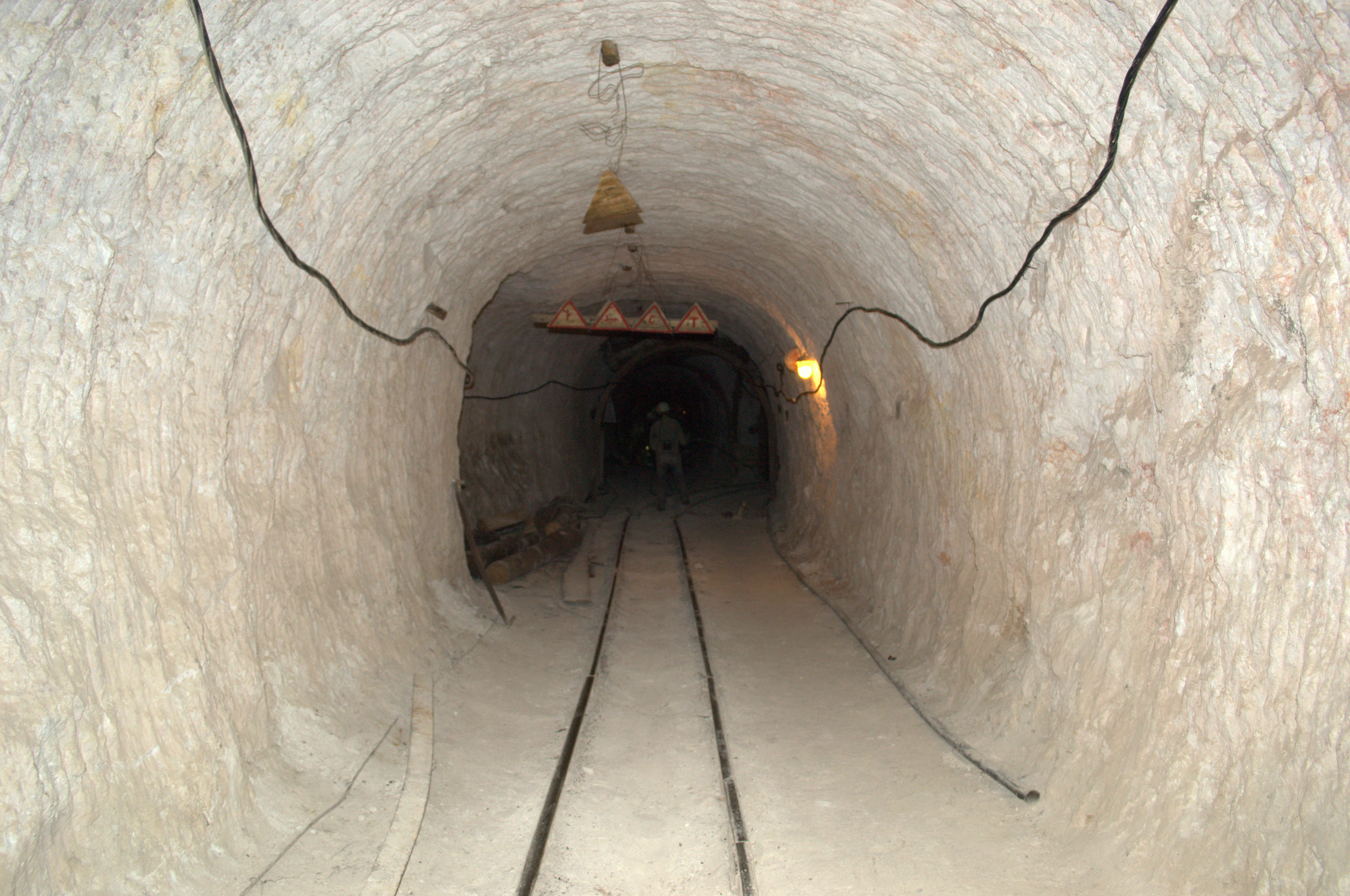 «Каолінова шахта „Кукля“», Берегівський р-н ДП «Берегівське ЛГ», Боржавське л-во, квартал 40. виділ 10, 14, 24